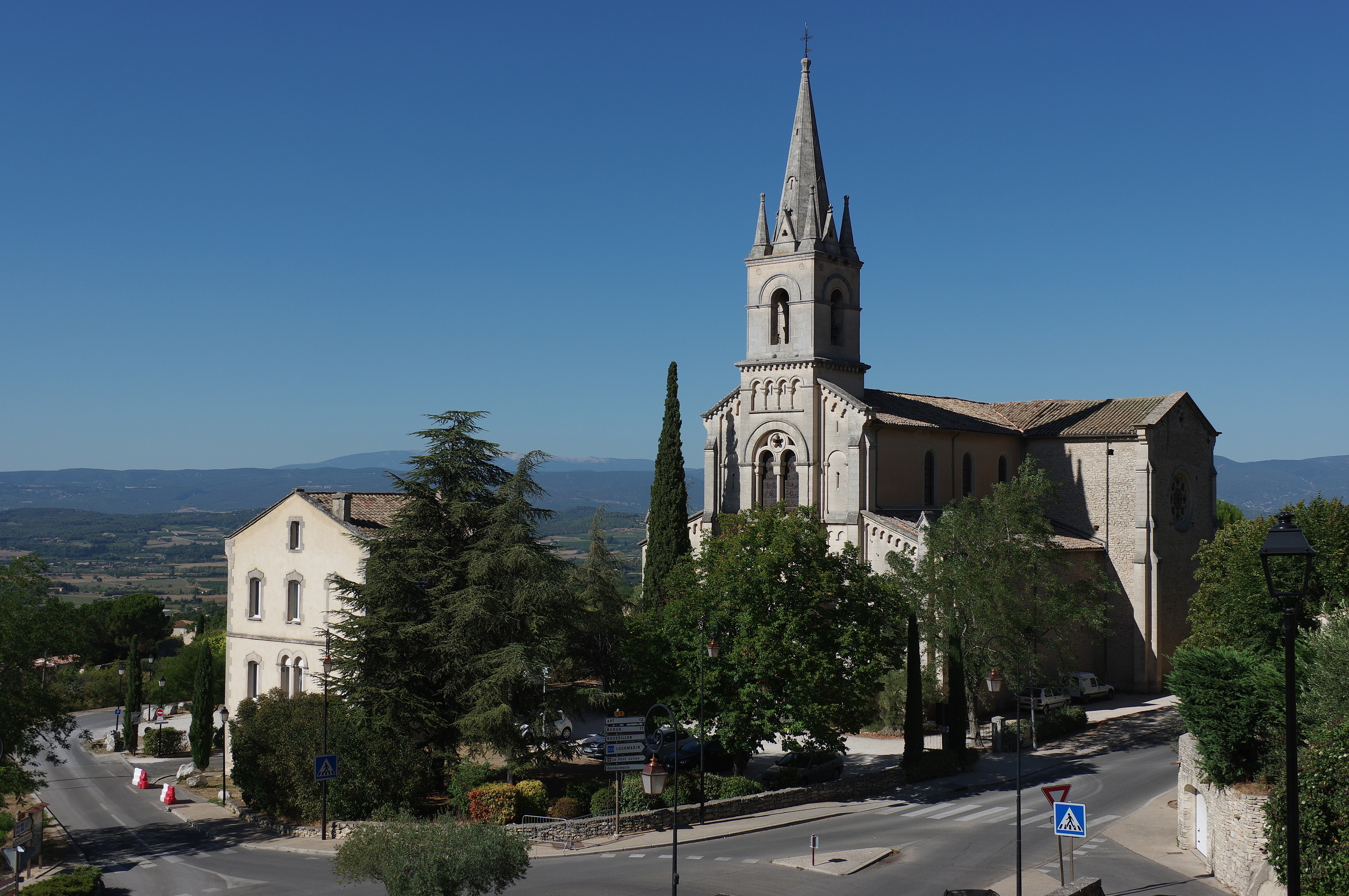 L'eglise neuve in Bonnieux (Vaucluse)